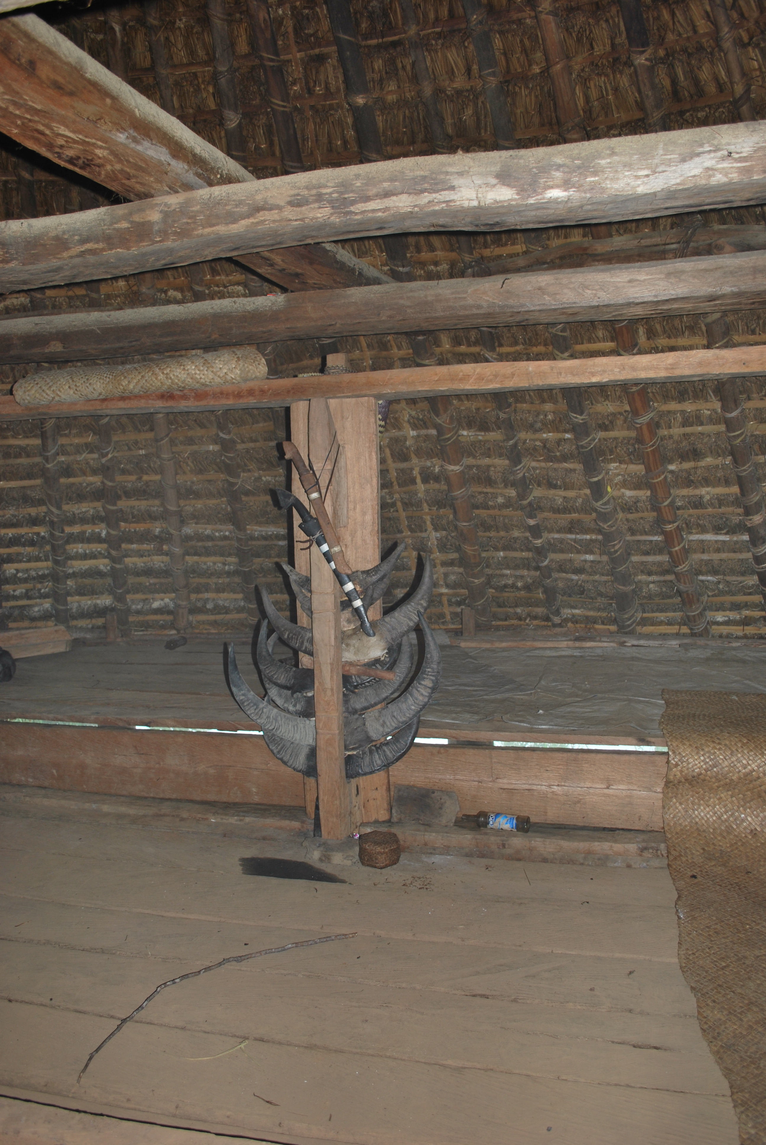 Uma Lulik in Hohulu, Suco Fatubessi, Ainaro